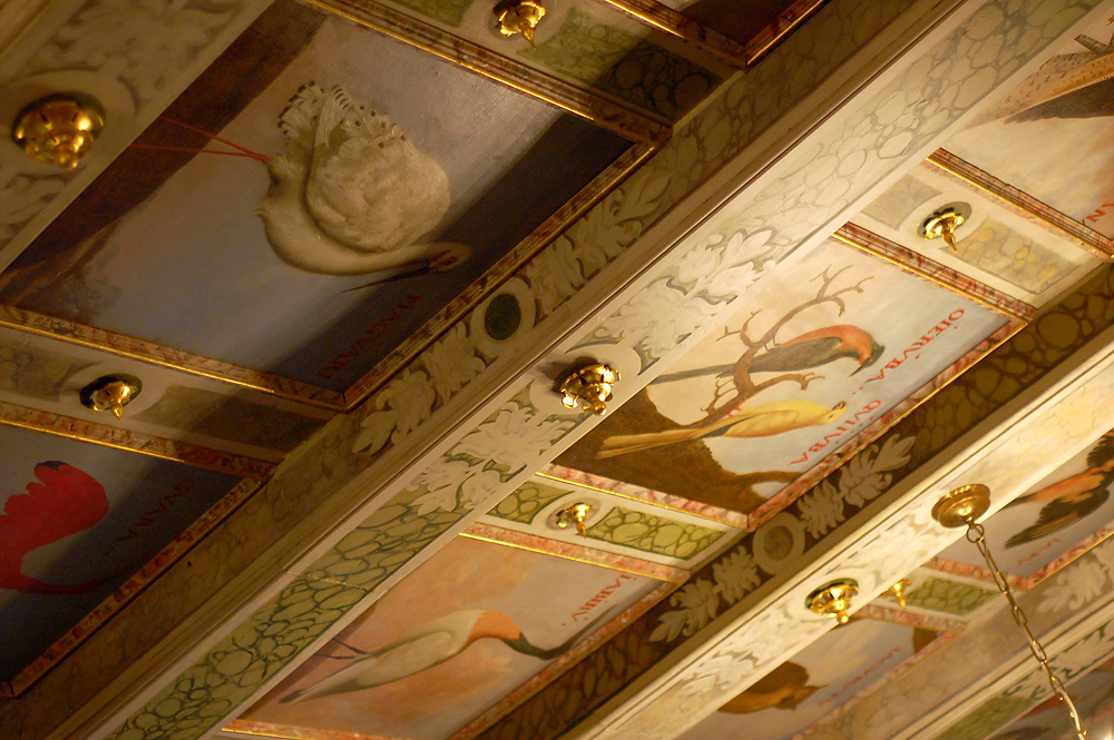 Kickoff-Seminar